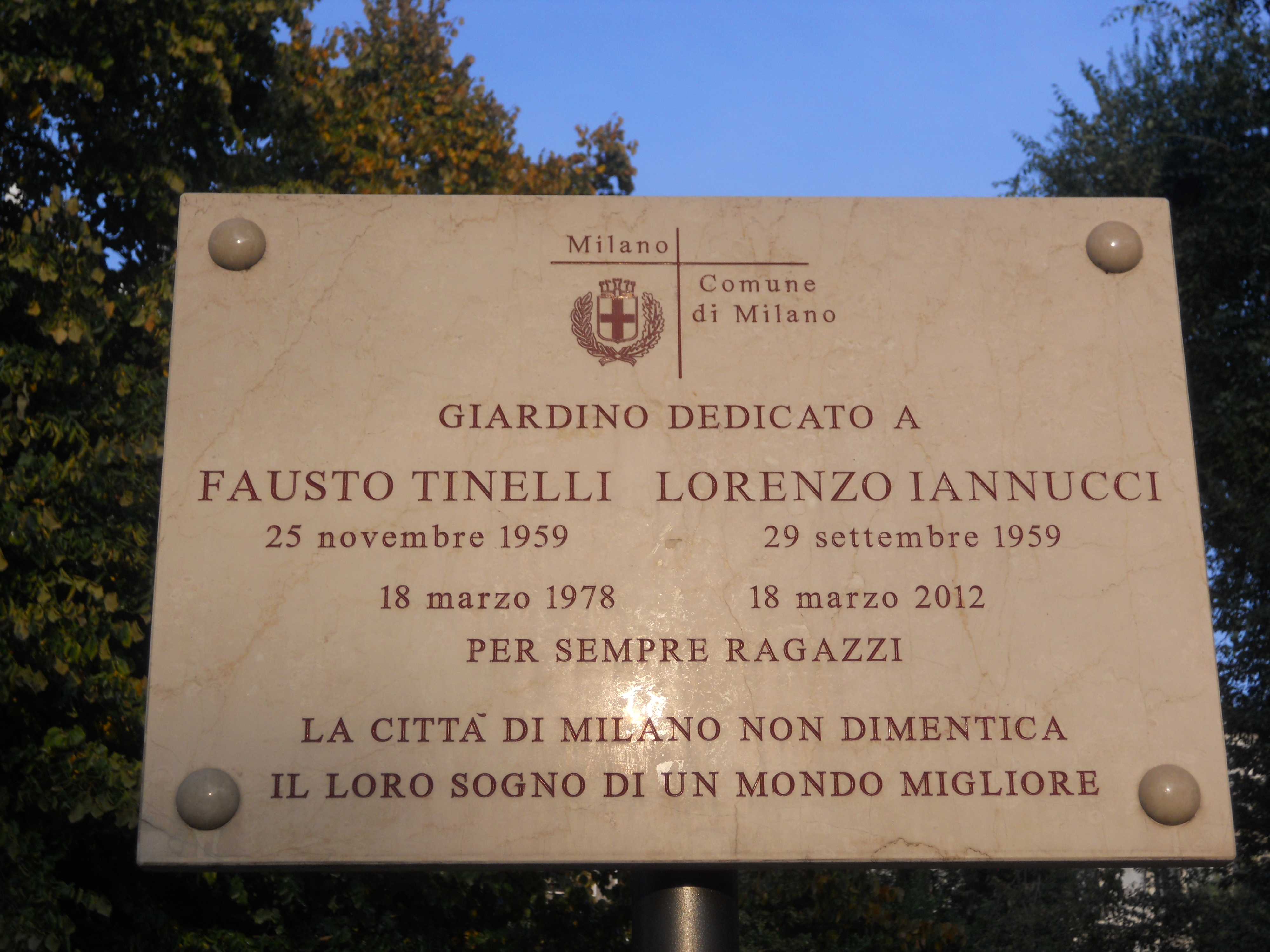 Giardini di Piazza Durante, intitolati dal 2012 a Fausto e Iaio, uccisi nel 1978 da estremisti di destra.